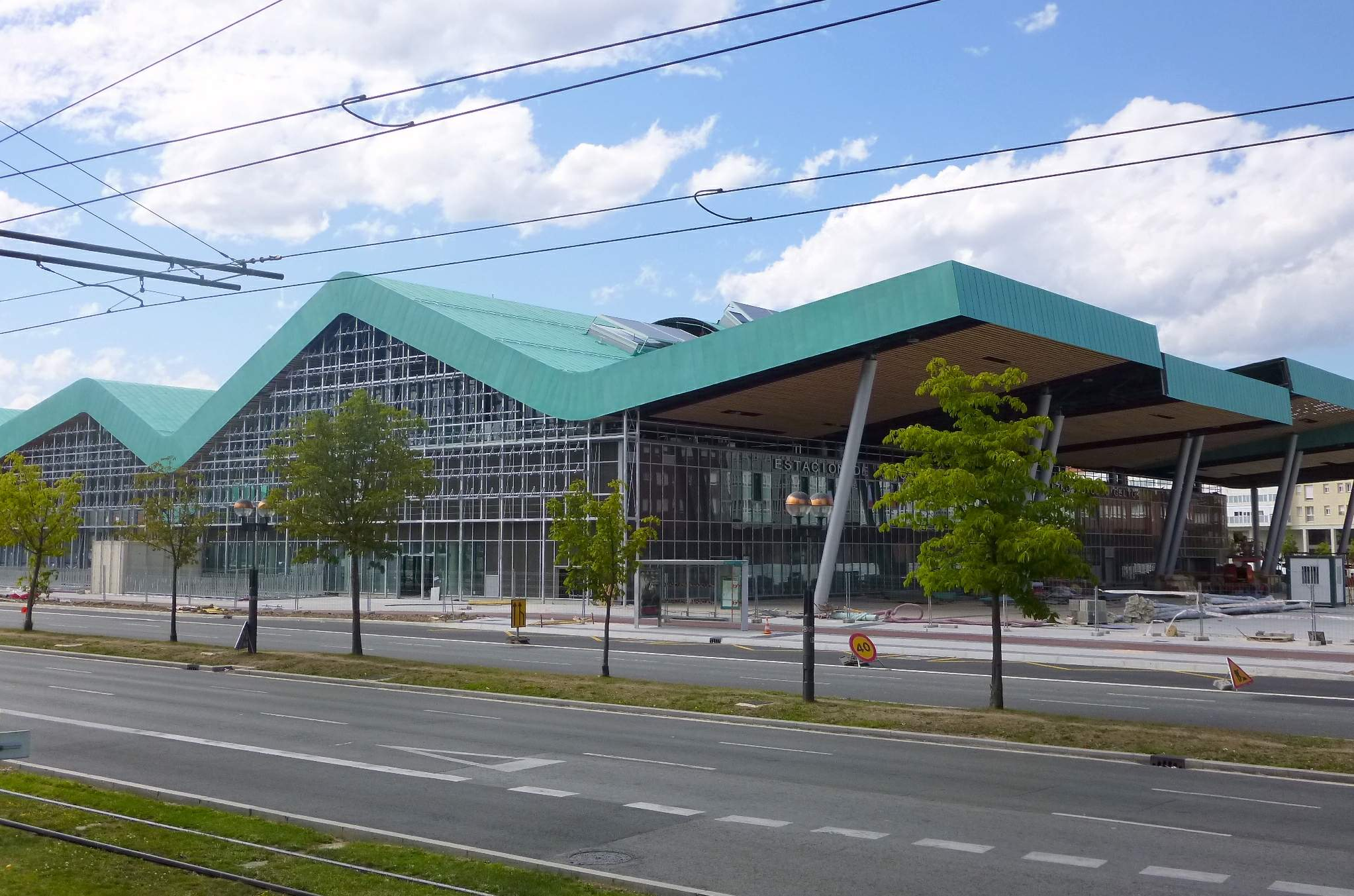 Estación de Autobuses de Vitoria-Gasteiz